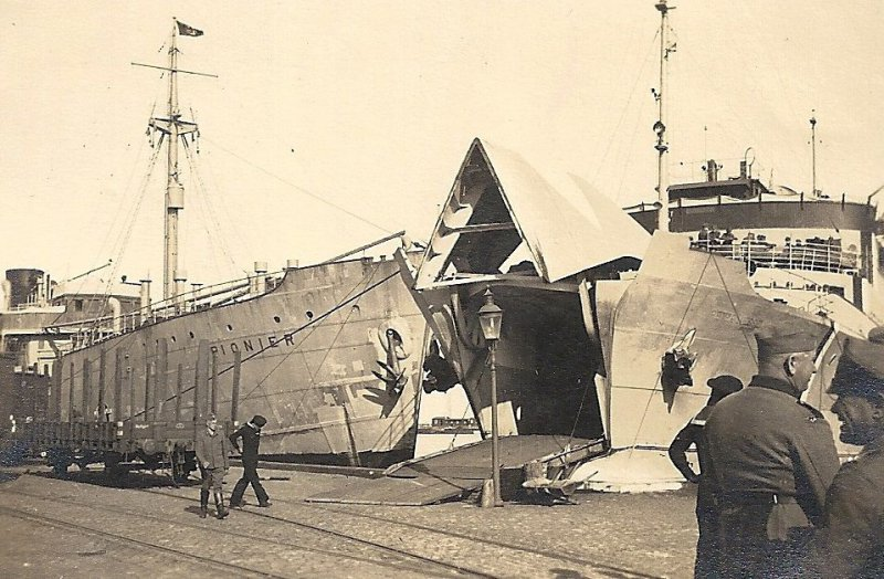 Kriegsmarine der Wehrmacht - Blick auf die PIONIER (Baujahr 1933); Truppentransporter